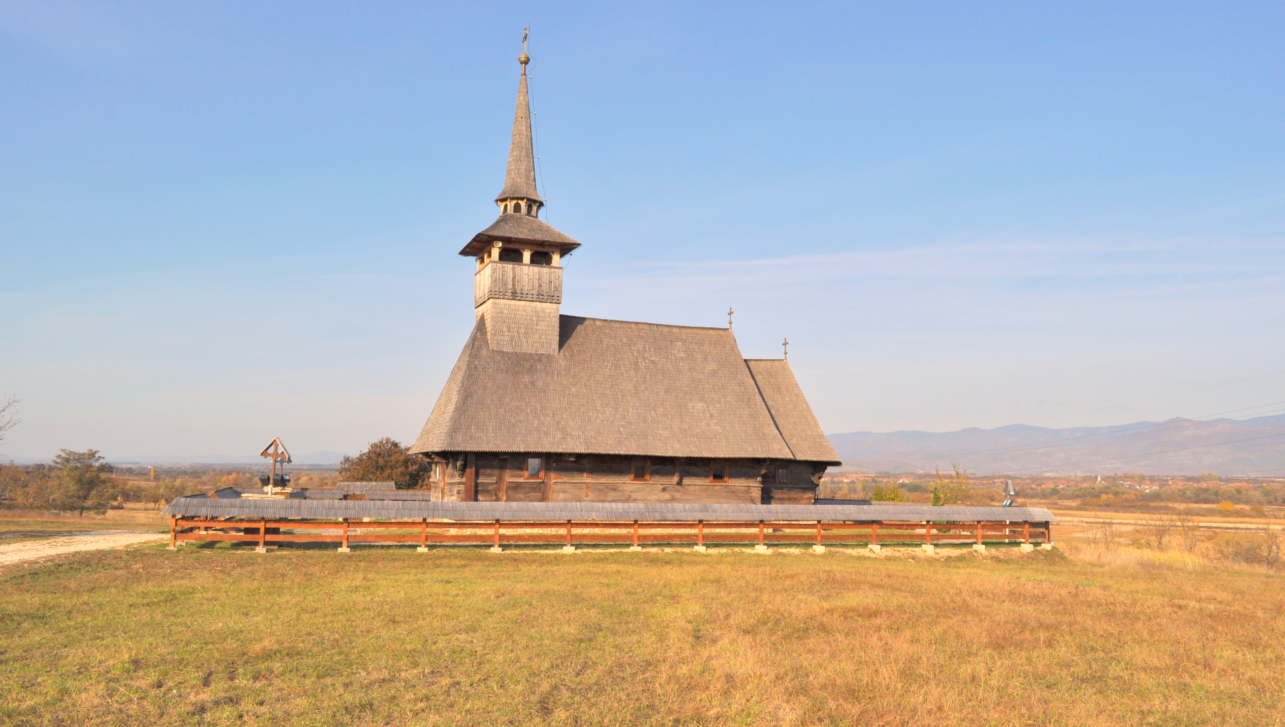 Biserica de lemn „Sf. Trei Ierarhi" din Ghighișeni mutată la Cucuceni